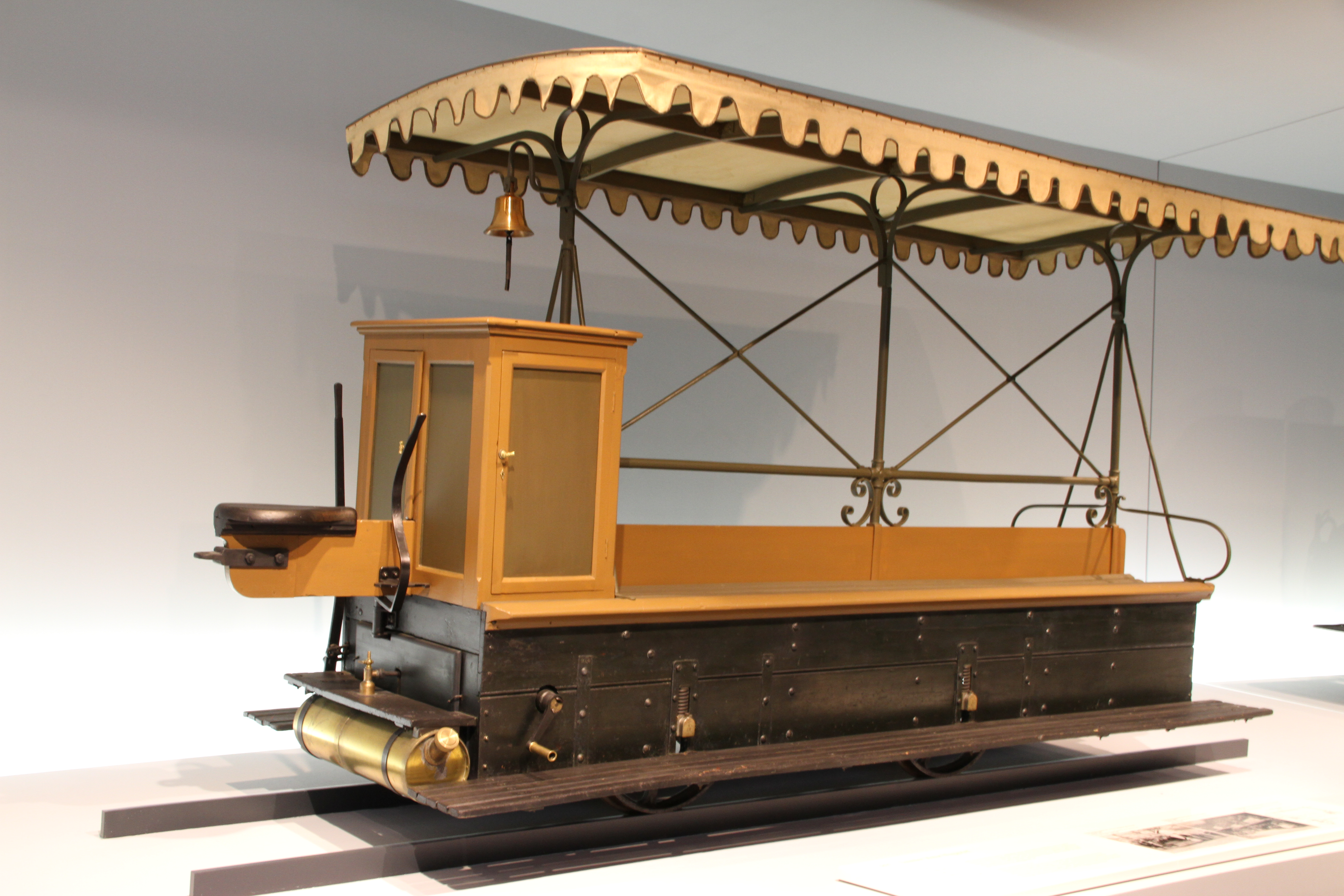 Daimler Motor-Waggonet 1887 nimmt Gottlieb Daimler anlässlich des Cannstatter Volksfestes eine motorisierte Schmalspur-Straßenbahn in Betrieb. Baujahr 1891, V2-Zylinder 1026 qcm Motor mit 2 PS bei 620 U/min, 20 km/h.